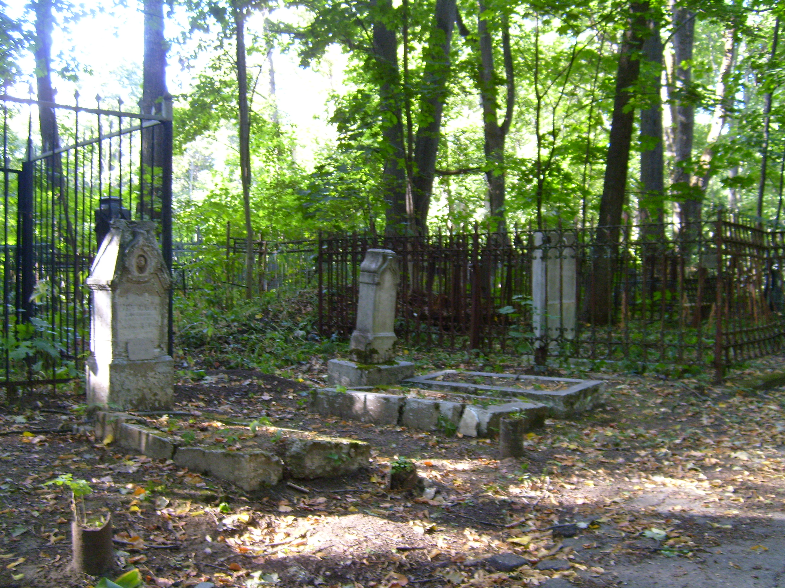 Всехсвятское кладбище (Тула)